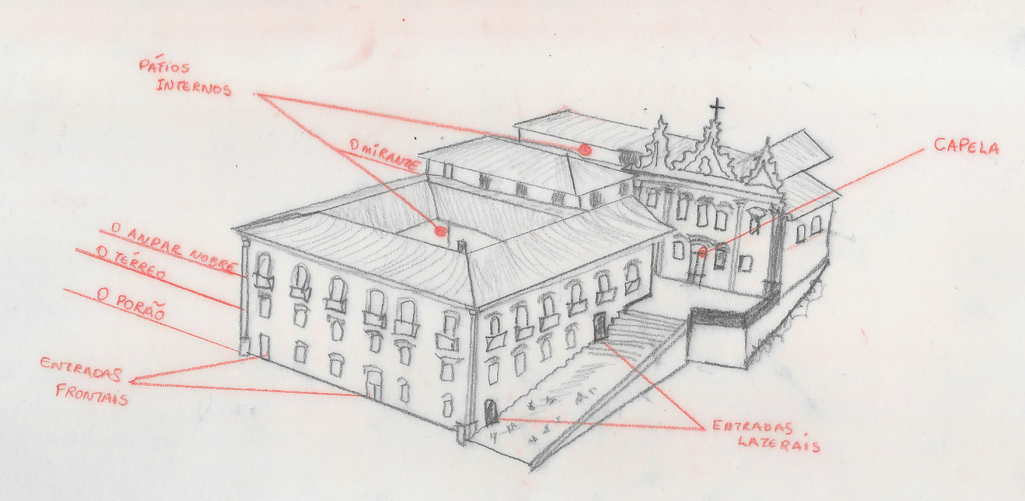 croqui engenho freguesia isometrica com adereços